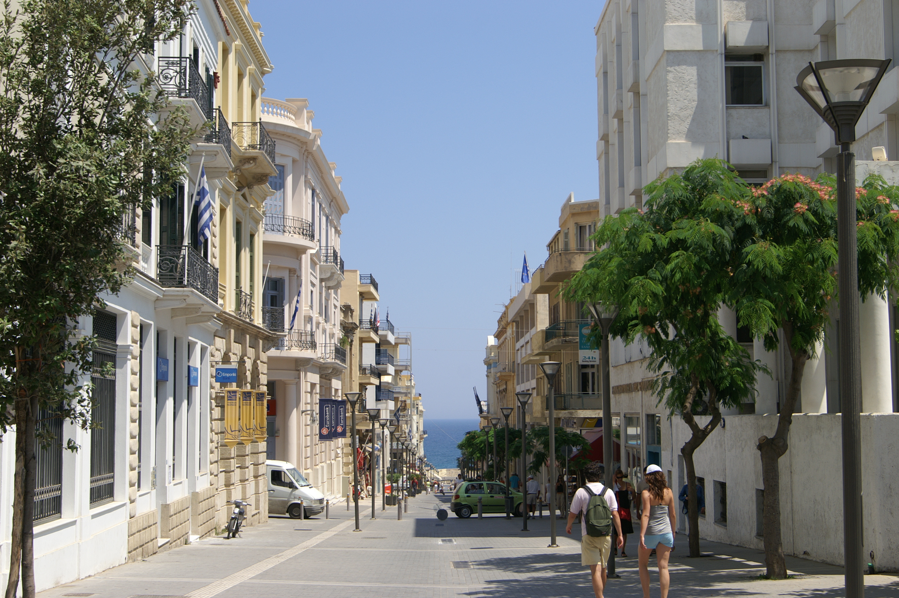 die Stadt Iraklio ist die größte Stadt der südgriechischen Insel Kreta